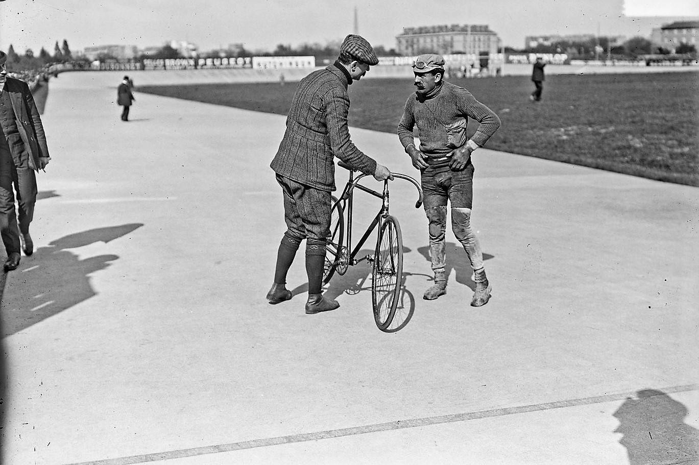 Emile Georget, 3e, descend de machine à son arrivée au Parc des Princes, le 2 mai 1909, lors de la course cycliste Bordeaux-Paris 1909